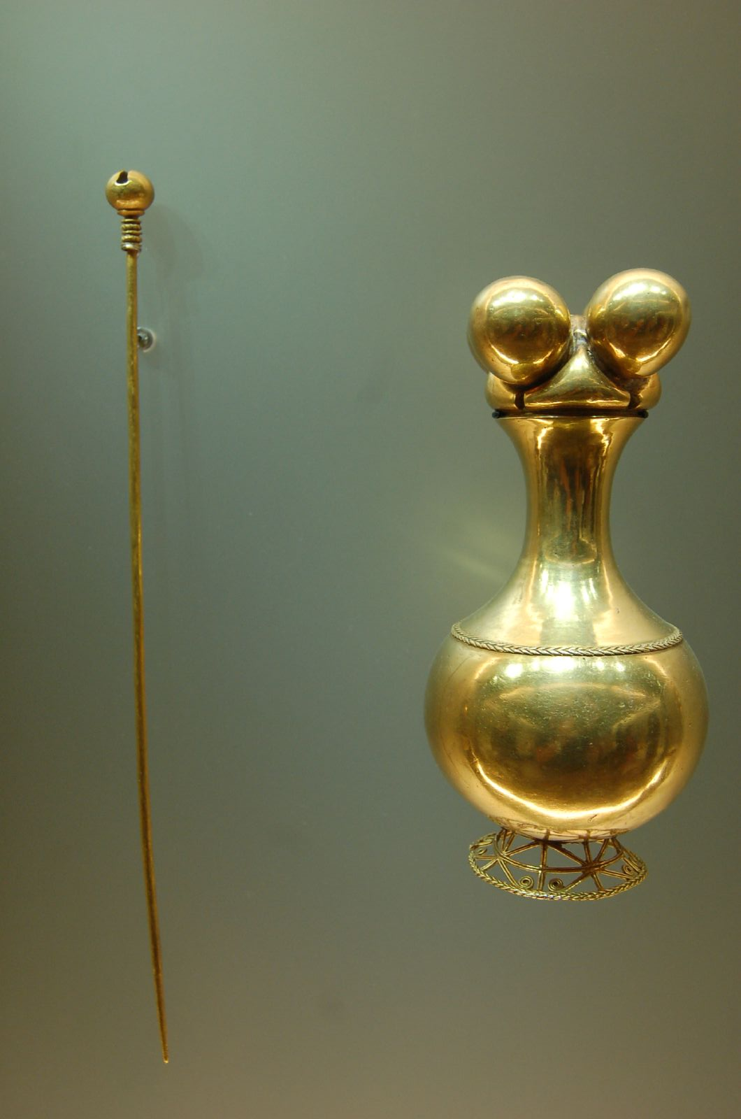 Poporo Quimbaya indigenous culture, Bogota - Colombia